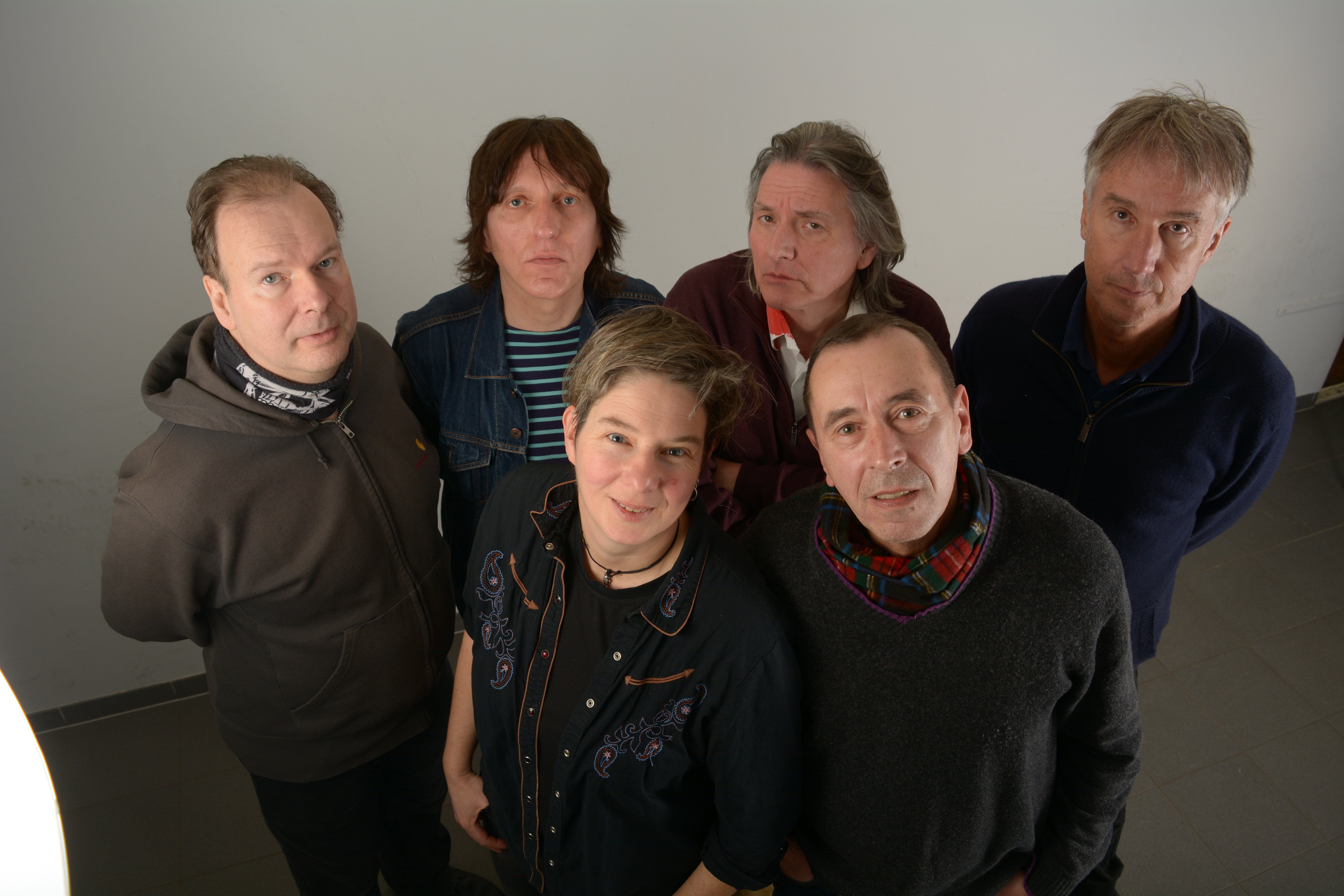 Fehlfarben Members 2016 Back left to right: Kurt Dahlke, Thomas Schneider, Peter Hein, Frank Fenstermacher. Front: Saskia von Klitzing and Michael Kemner